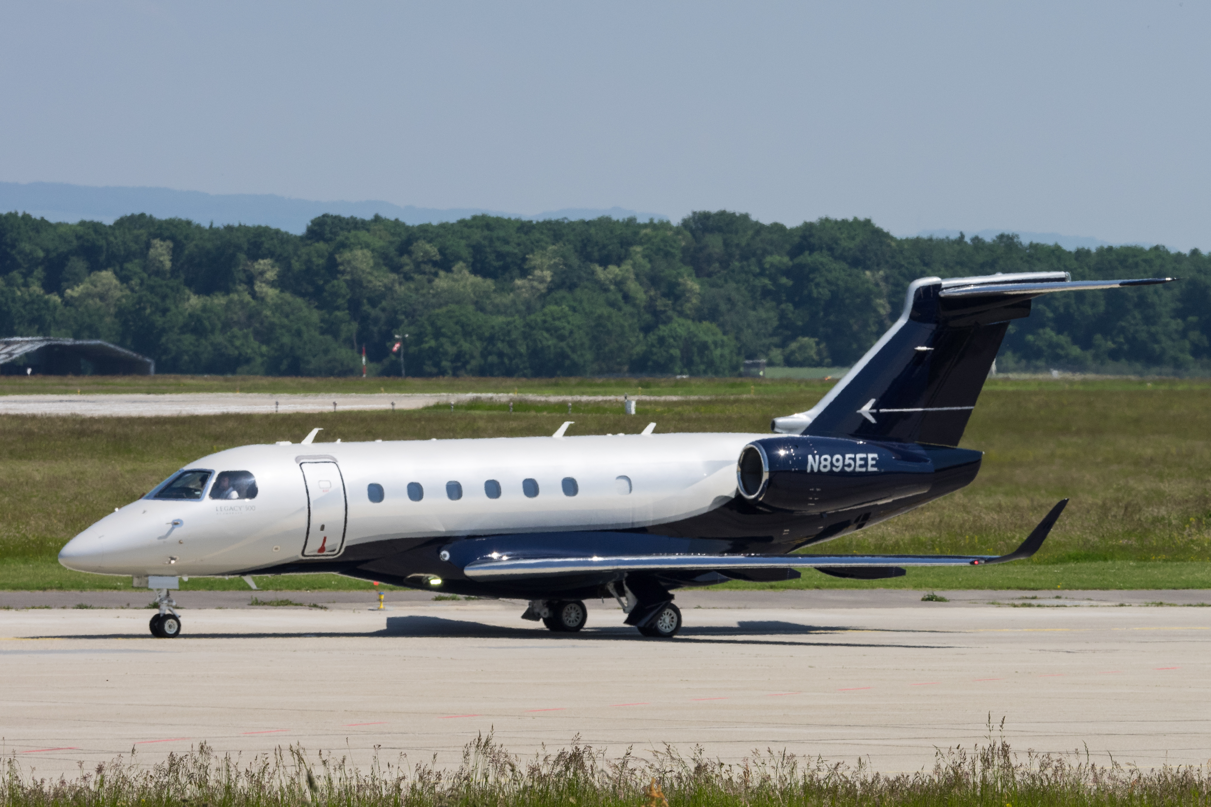 GVA 22.05.2015